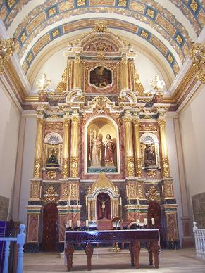 Interior i retaule major de l'església arxiprestal de sant Pere i sant Pau d'Ademús (València).